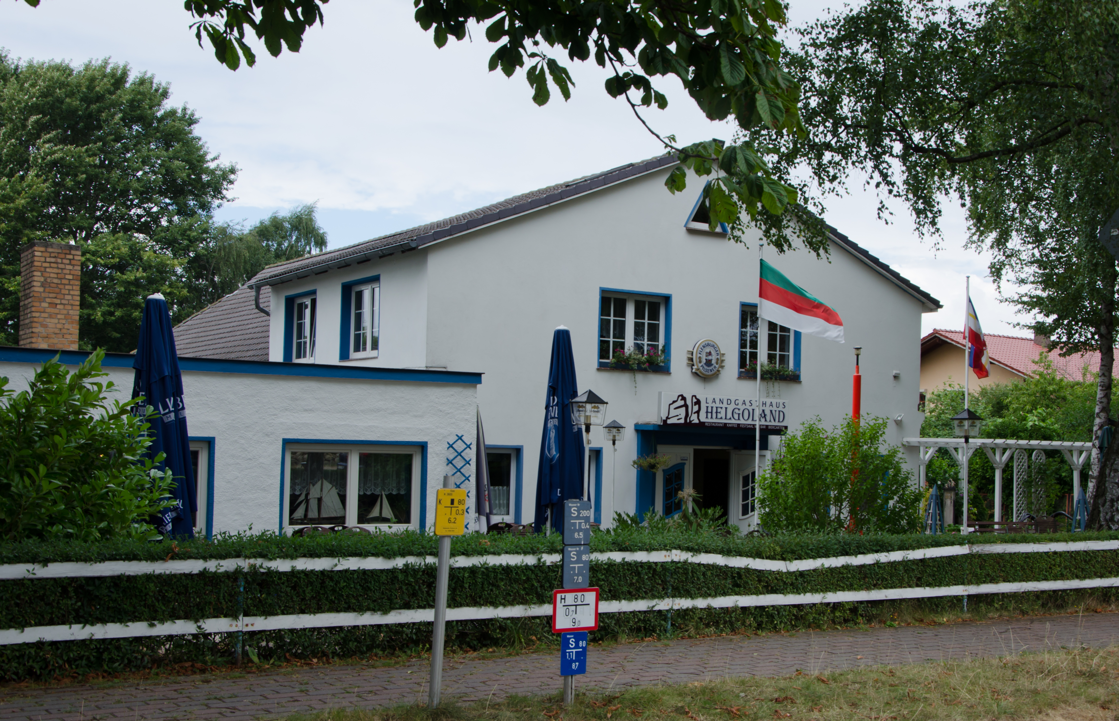 Hohenfelde - Landgasthaus Helgoland